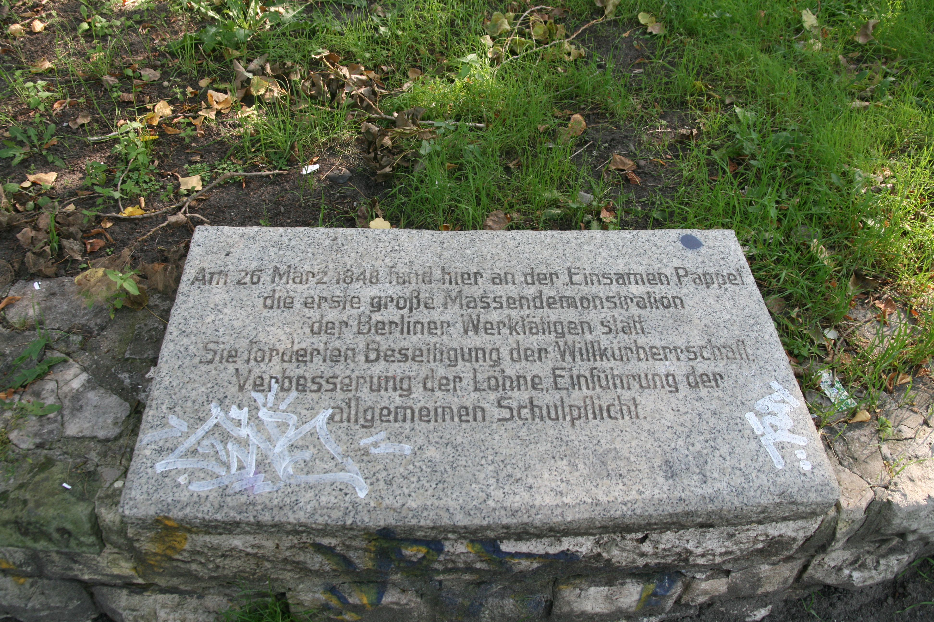 Gedenkstein - an der " Einsamen Pappel " Gedenkstätte - Gartendenkmal Standort Massendemonstration - Märzrevolution 1848 Topstraße - Cantianstraße - Schönhauser Allee